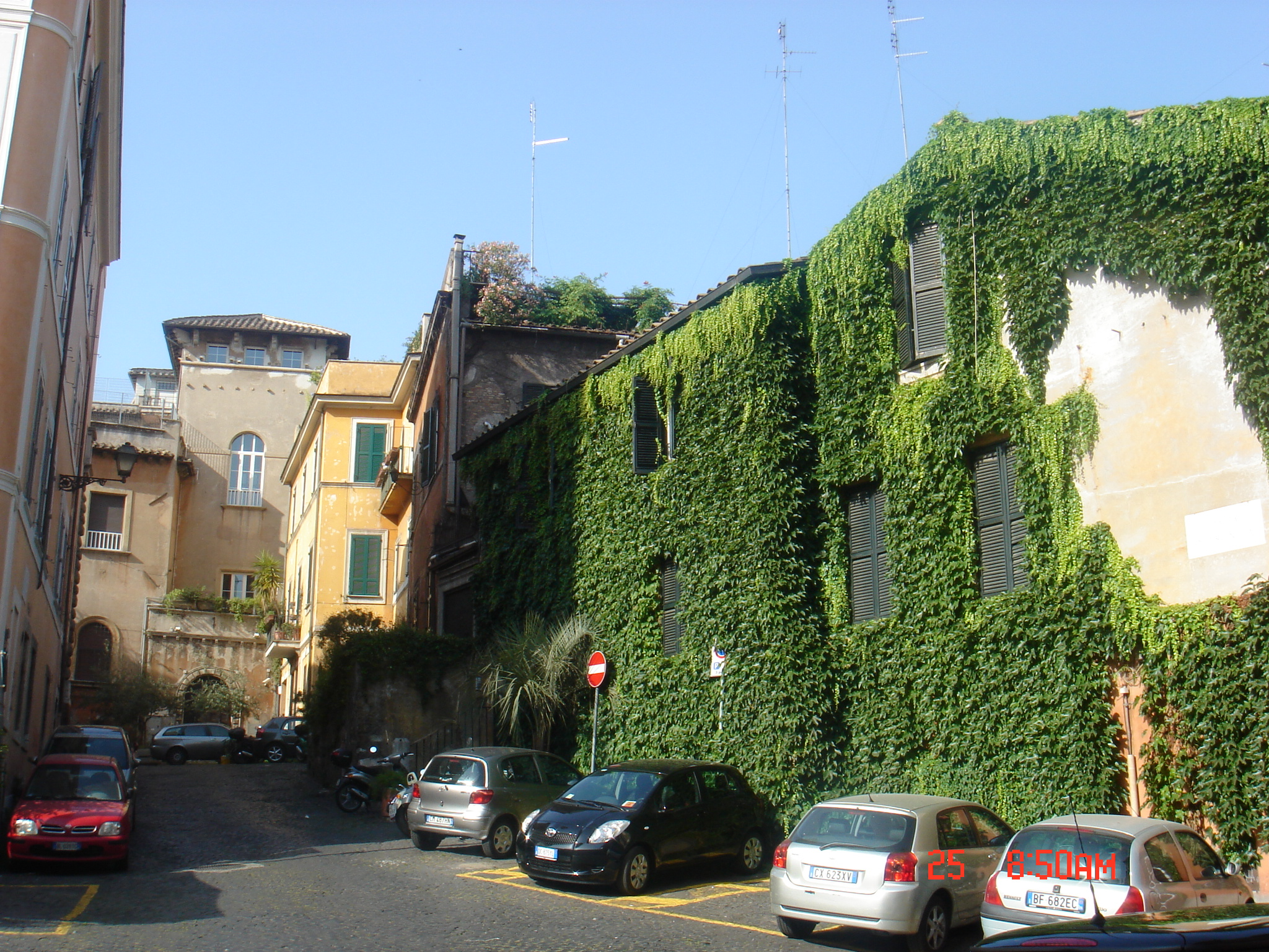 Roma, via dell'Arco dei Tolomei, tratto verso Piscinula.